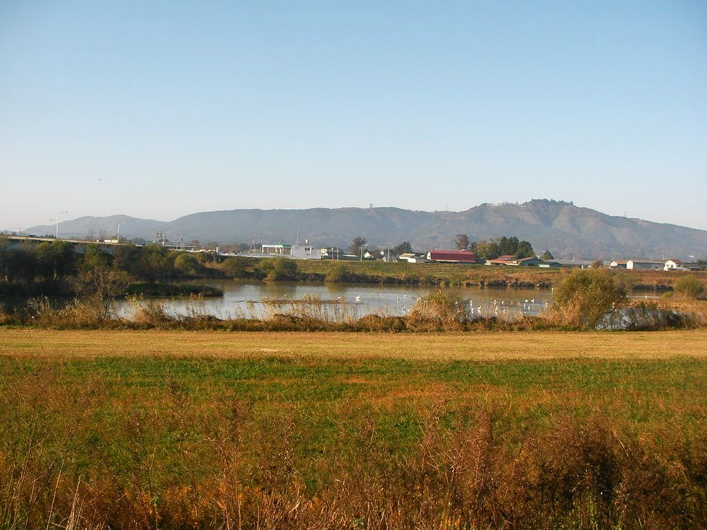 迫川（登米市豊里町二ツ屋橋付近）